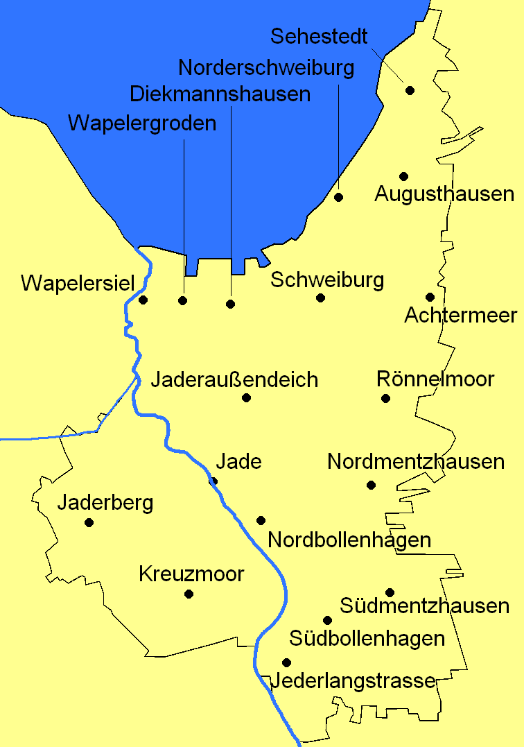 Übersichtskarte der Gemeinde Jade